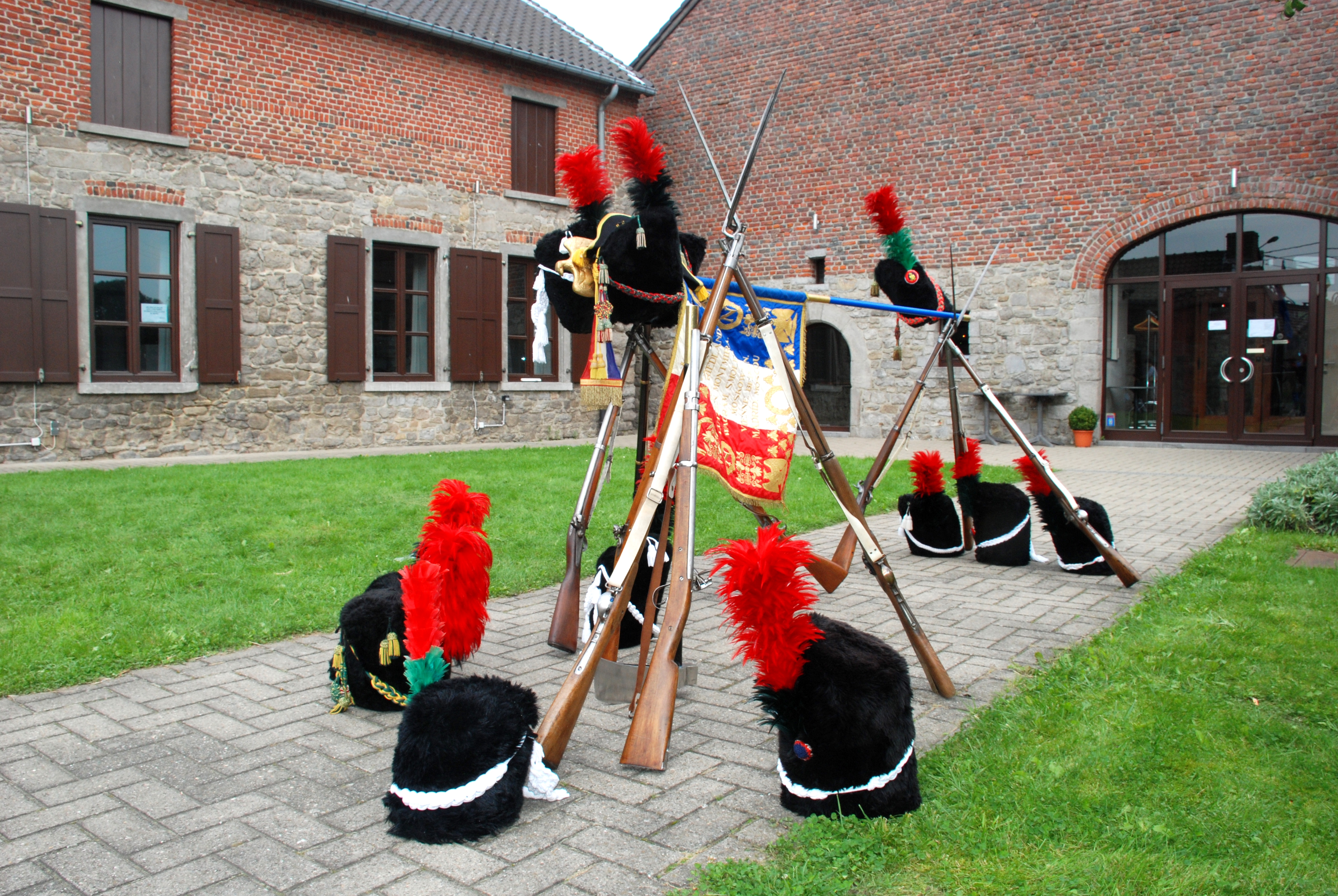 Belgique - Province de Namur - Sombreffe - Ligny - Centre général Gérard - Faisceau d'armes du 1er régiment de la Garde Impériale dans la cour du Centre